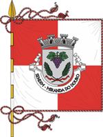 Bandeira de Sendim(Portugal) 150px